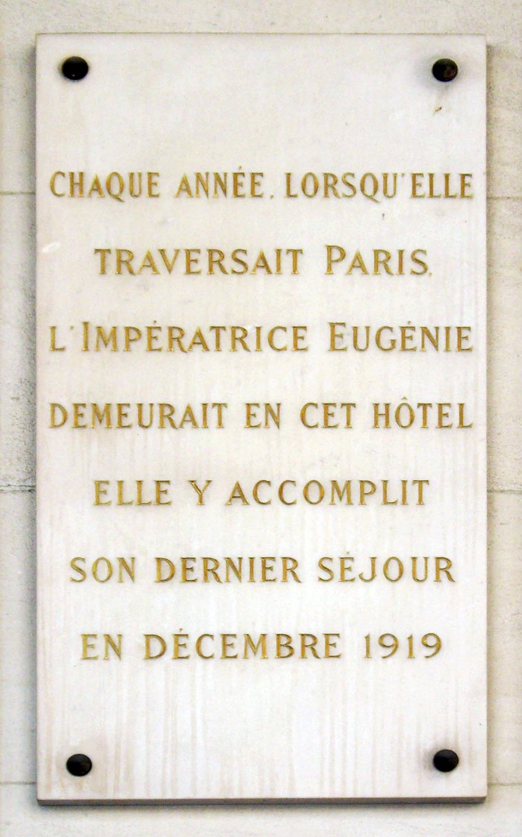 Plaque apposée sur la façade de l'hôtel Westin au n° 3 de la rue de Castiglione, Paris 1er. « Chaque année, lorsqu'elle traversait Paris, l'impératrice Eugénie demeurait en cet hôtel. Elle y accomplit son dernier séjour en décembre 1919. »